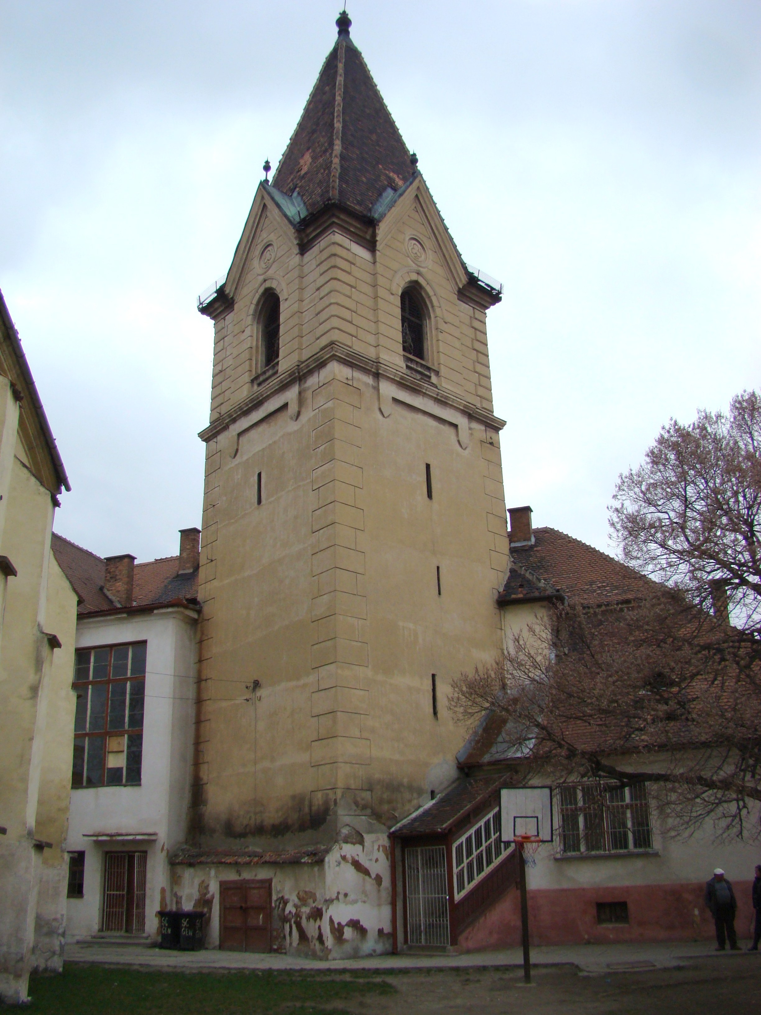 Biserica evanghelică fortificată, sat TÂRNAVA; comuna TÂRNAVA, județul Sibiu 01